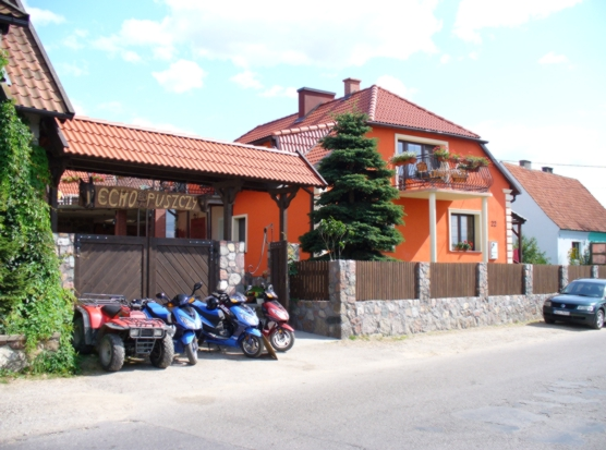 Jeziorowskie